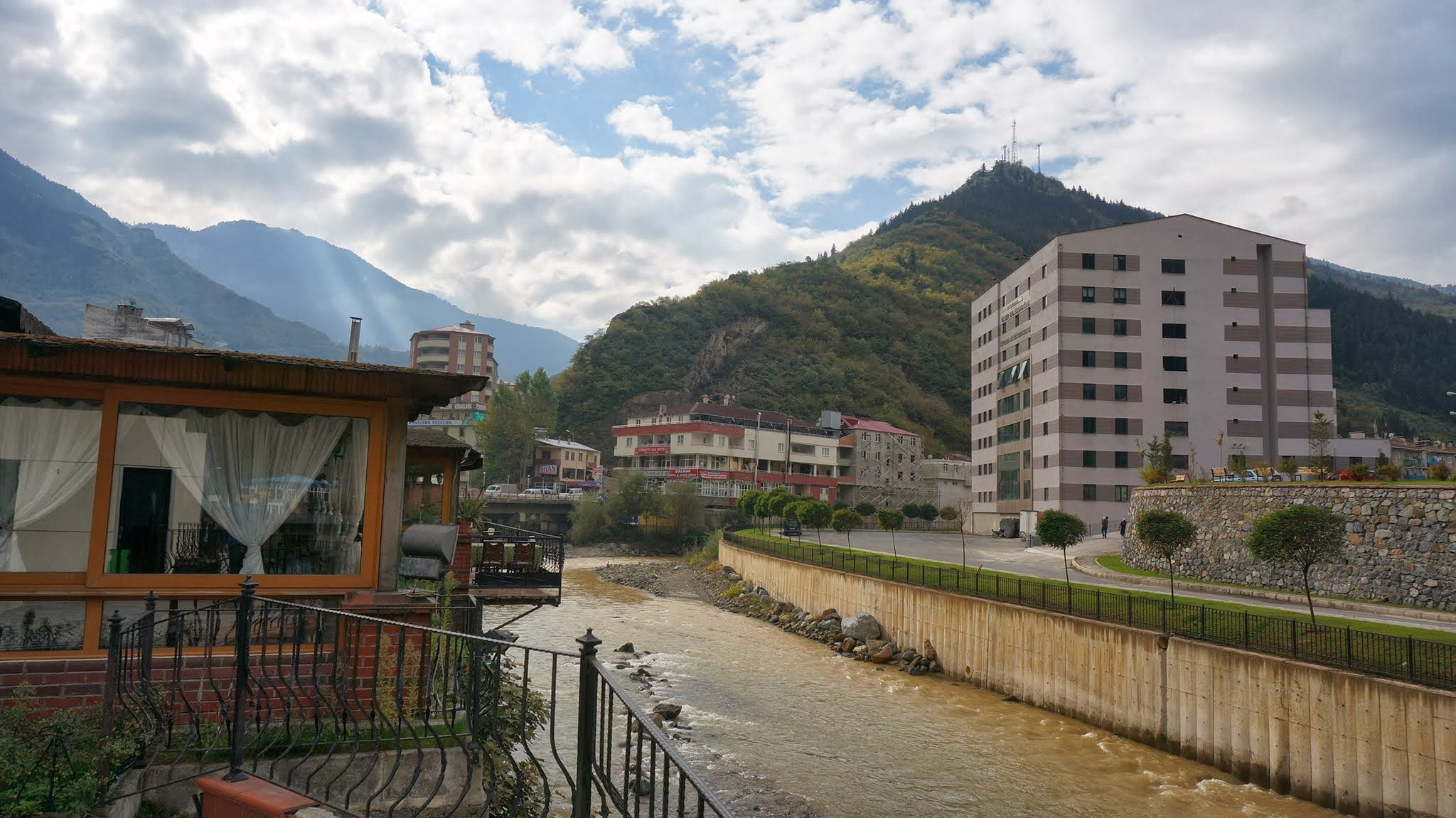 Maçka, Merkez, 61750 Maçka/Trabzon, Turkey